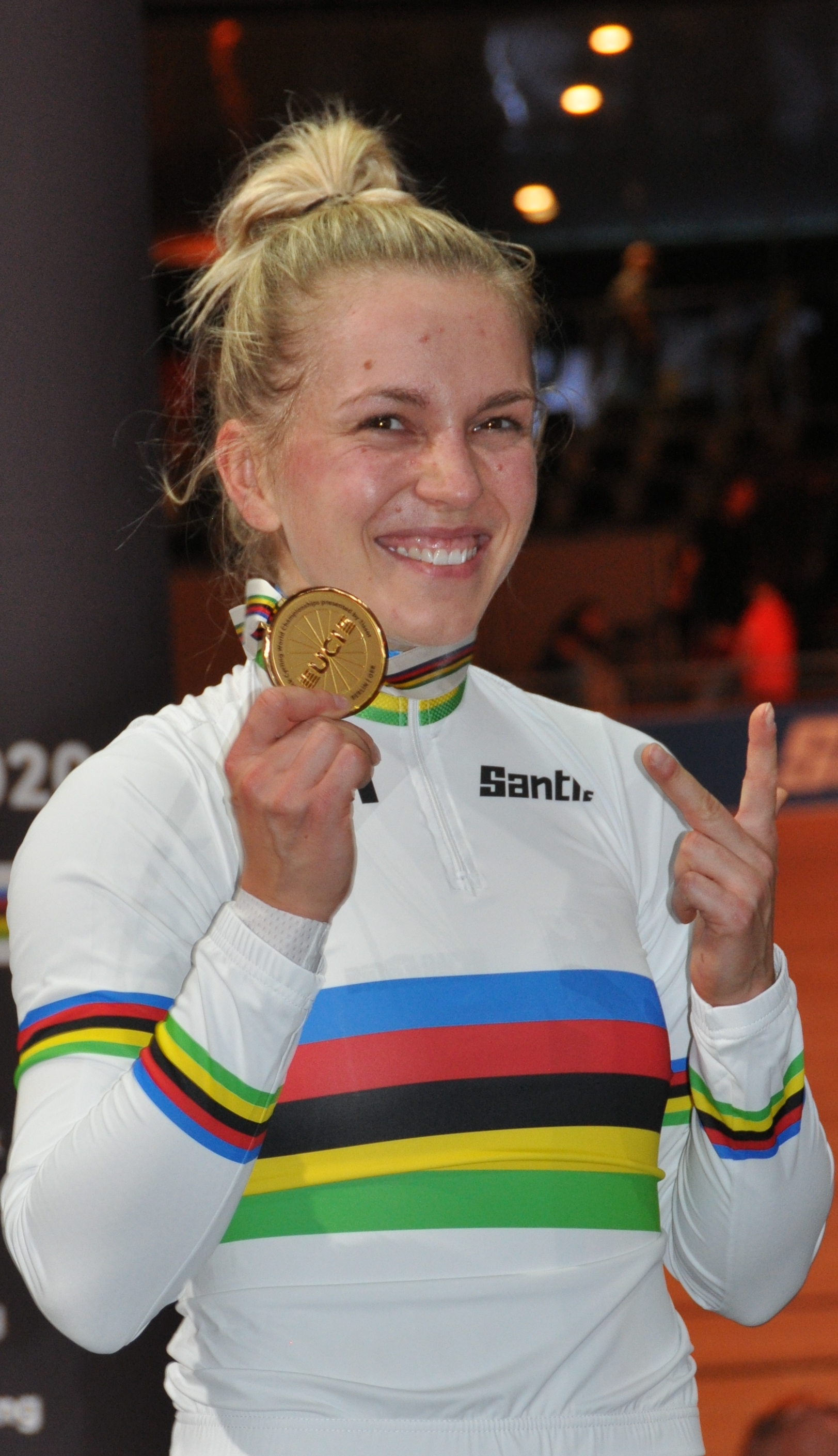 Emma Hinze, deutsche Radsportlerin - Weltmeisterin im Keirin